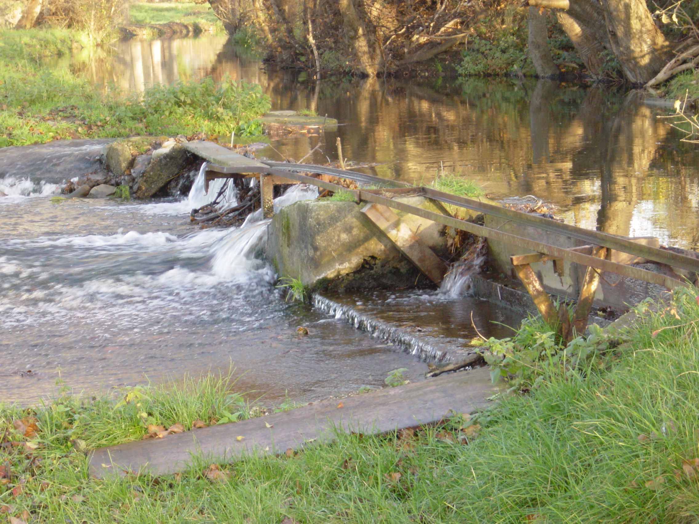 Abschlagbauwerk am Mühlenteich bei Altenburg/Jülich zur Rur